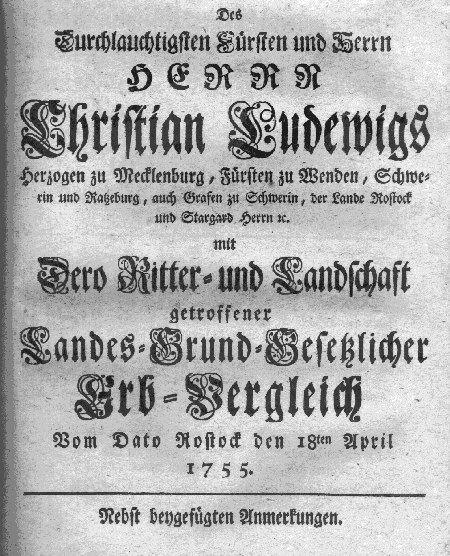 Landesgrundgesetzlicher Erbvergleich Mecklenburg Titelbild